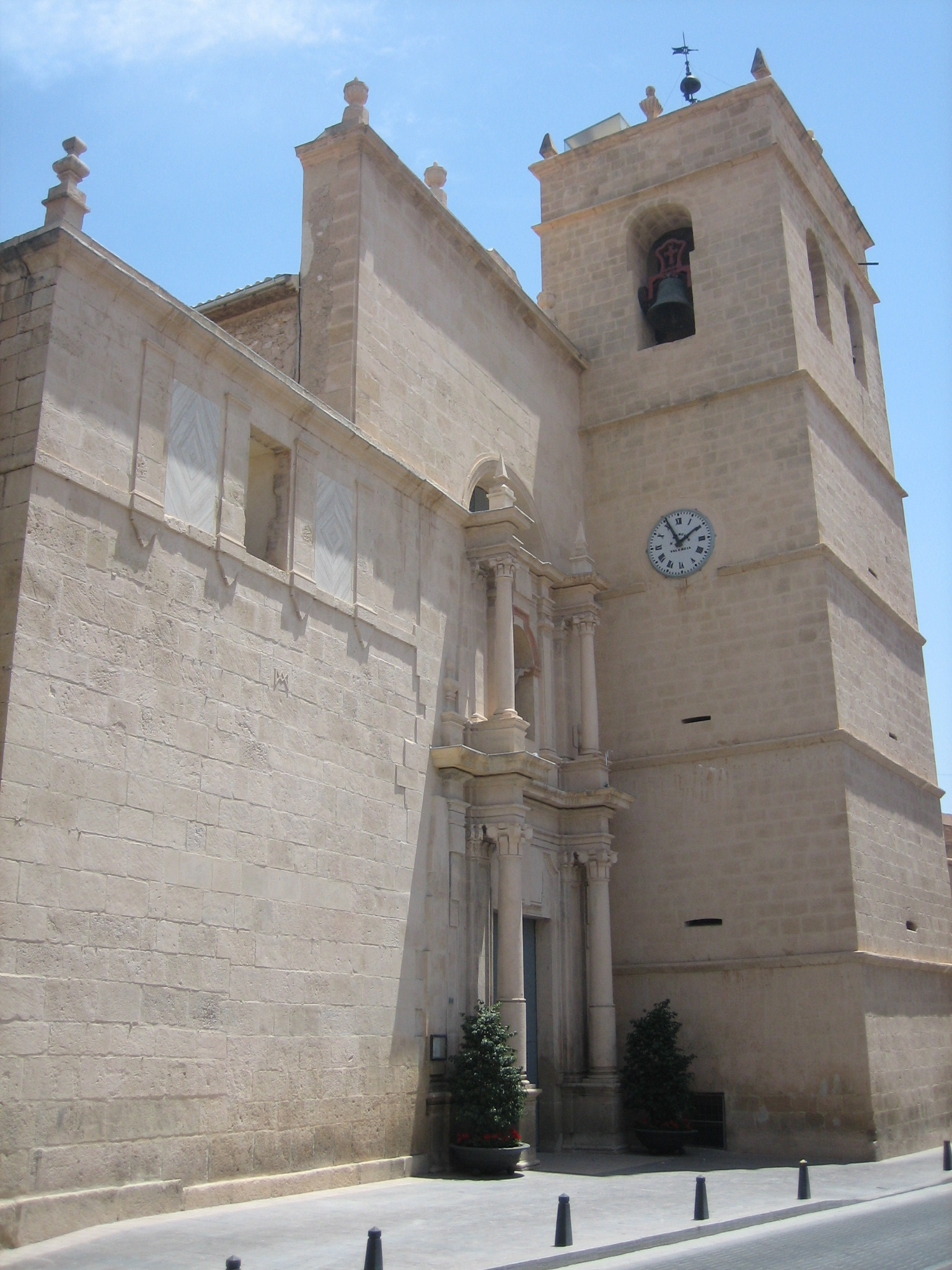 Església del Salvador de Mutxamel (Mutxamel, l'Alacantí, País Valencià)